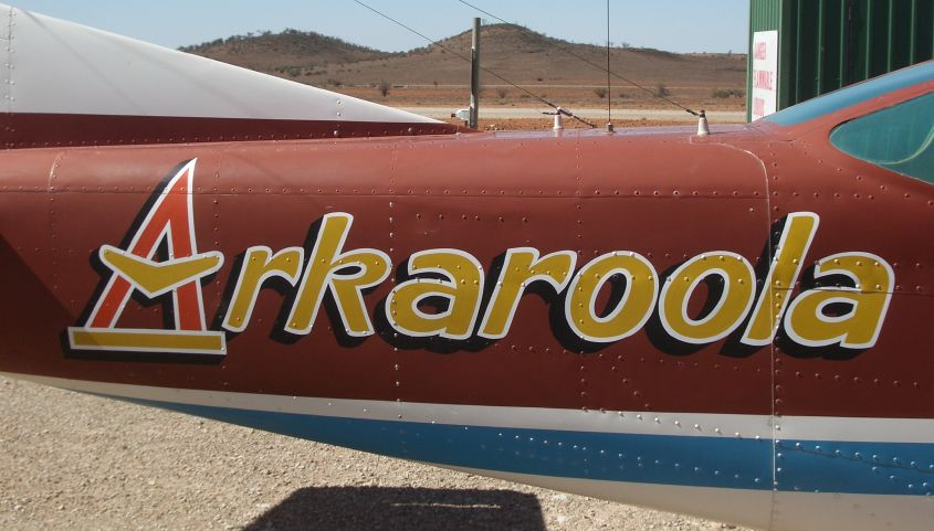 Arkaroola Airplane